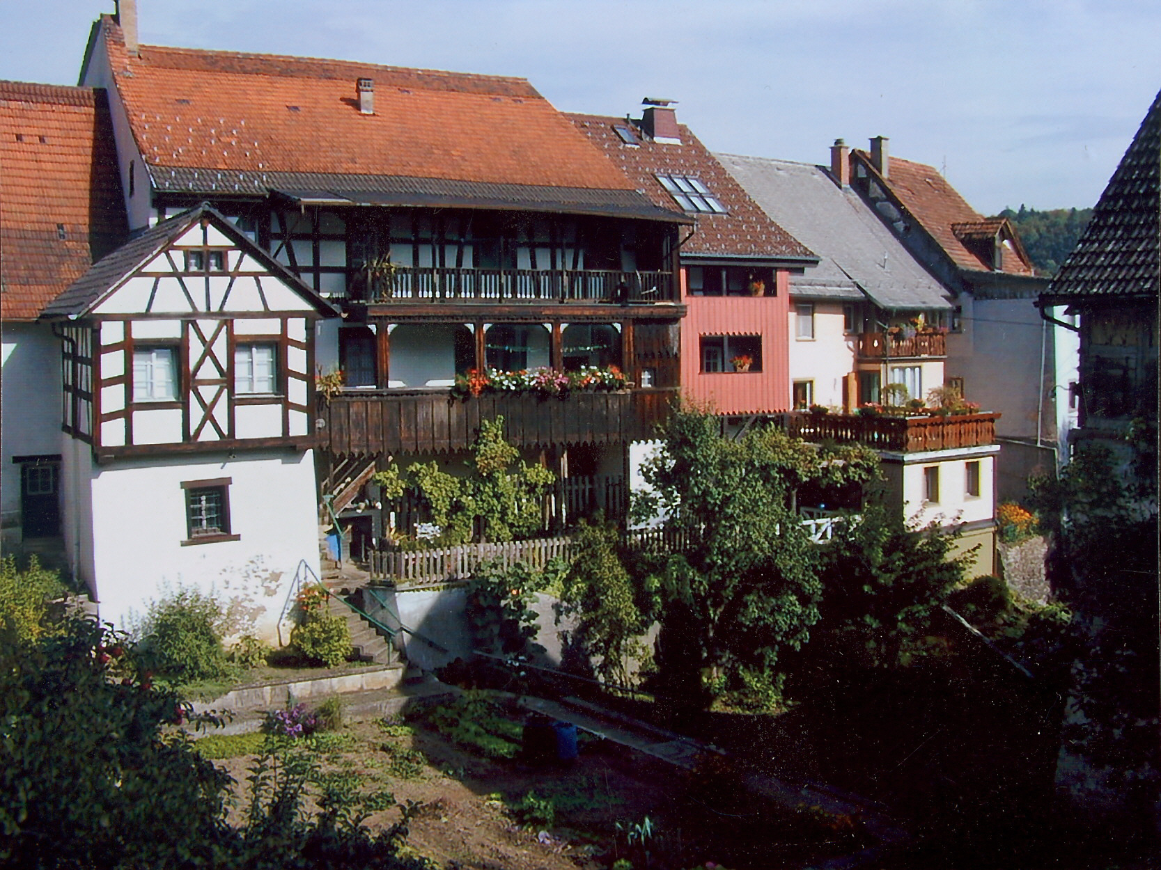 Westseite der Altstadt von Stühlingen, Landkreis Waldshut, Baden-Würrtemberg am ehemaligen Stadtgraben.